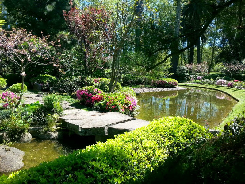 Jardín Japones en Montevideo.